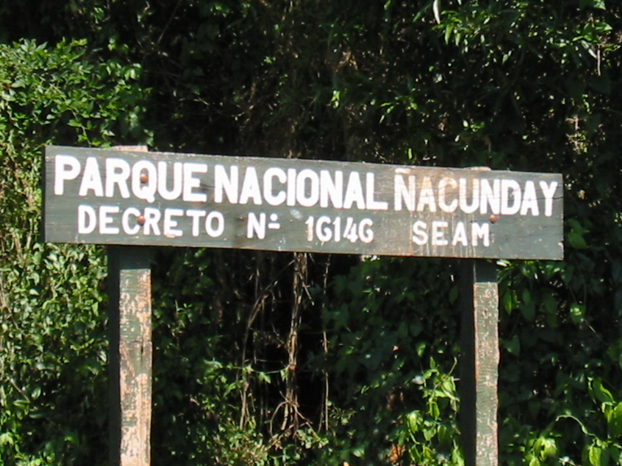 Fotos tomadas por mí, a inicios del año 2008 entrada del Parque